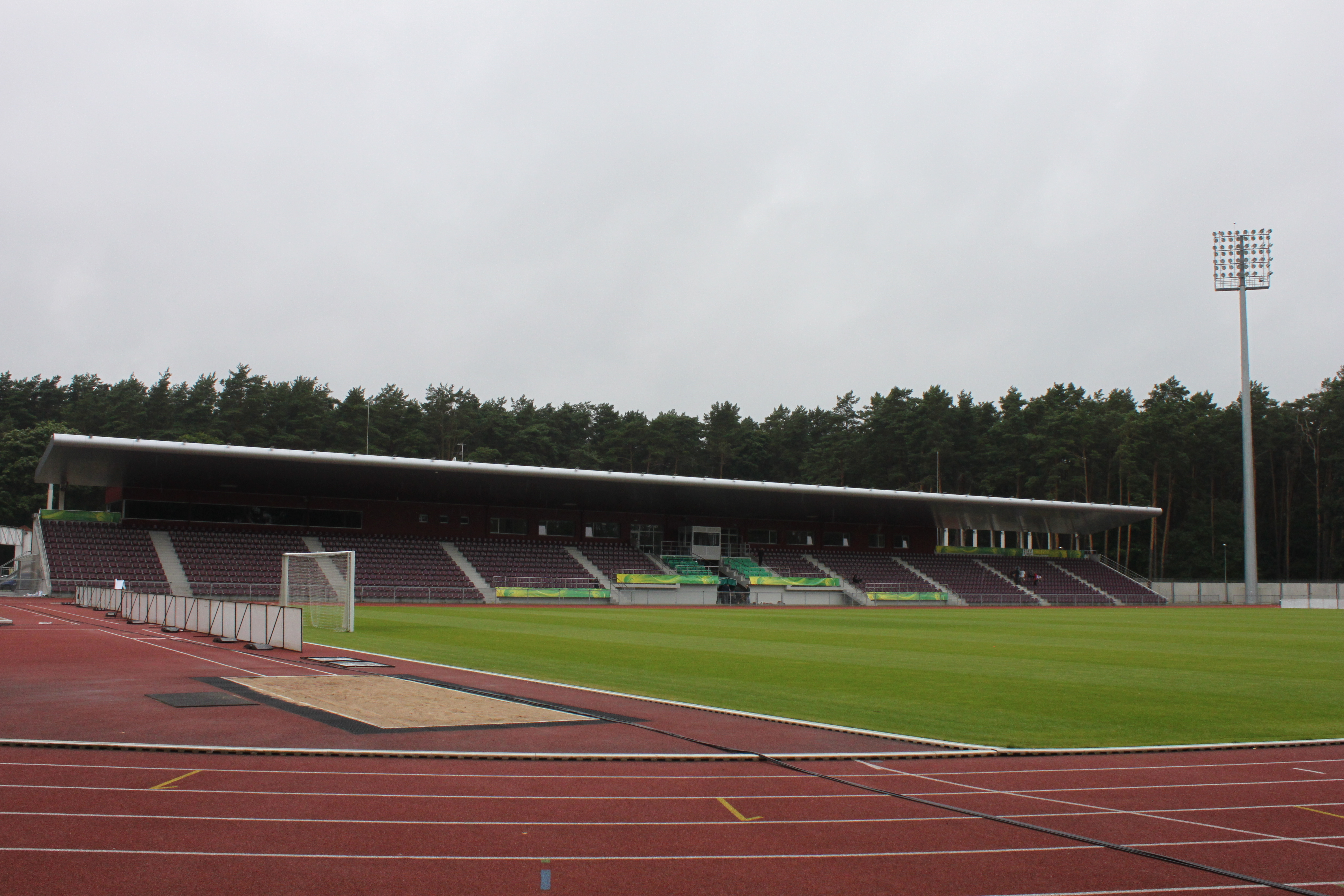 Alytaus stadionas